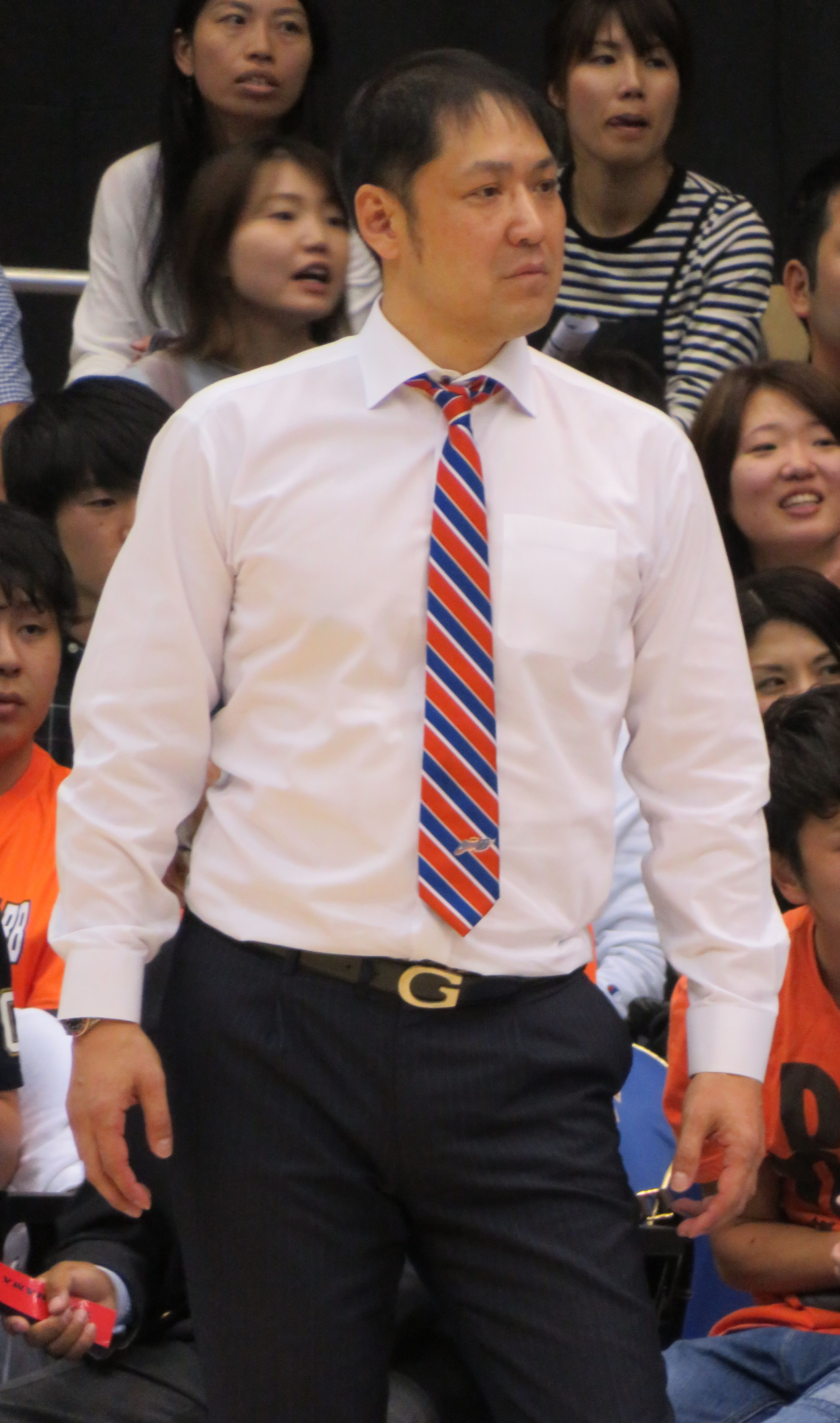 2018年10月24日 2018-19 B1 第5節 横浜-新潟 横浜国際プール